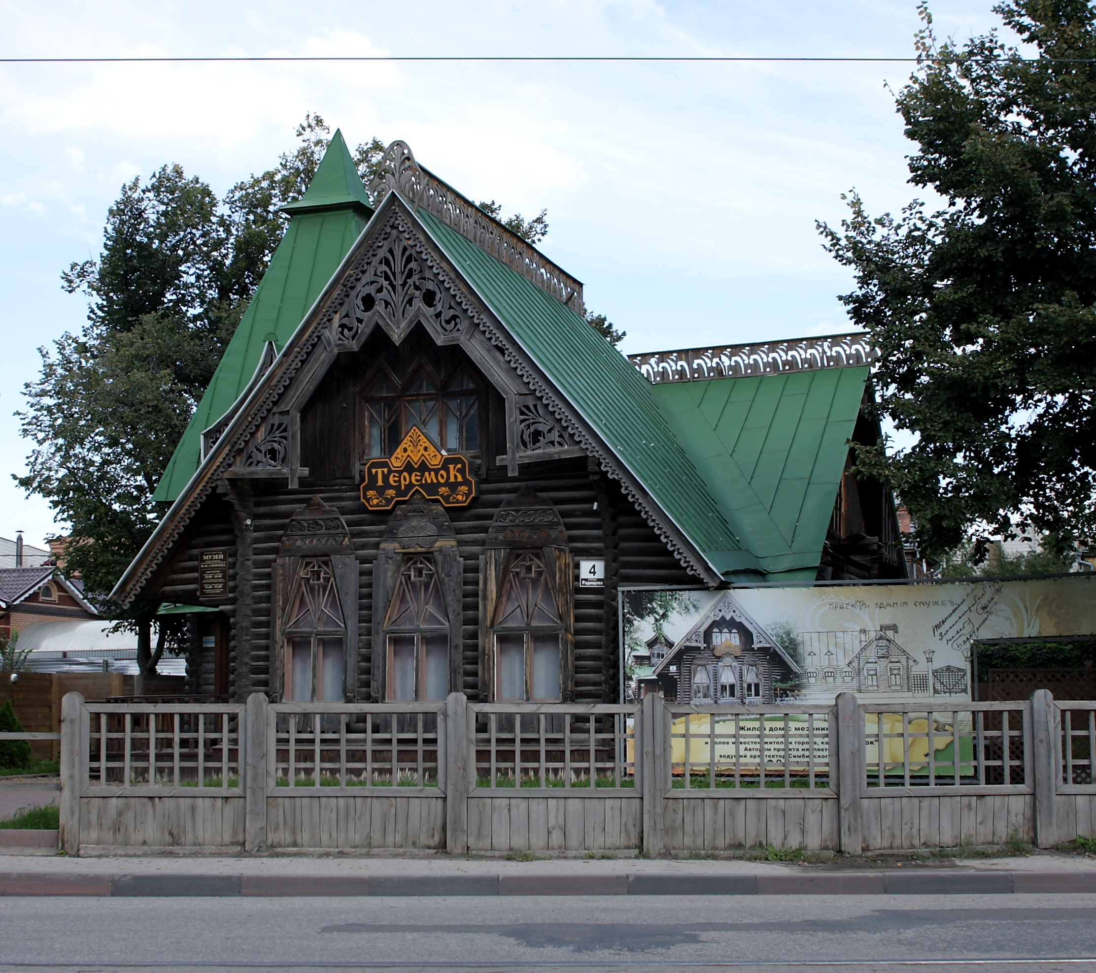 Дом-особняк купца Бокунина: улица Радищева, 4, Ульяновск, Ульяновская область